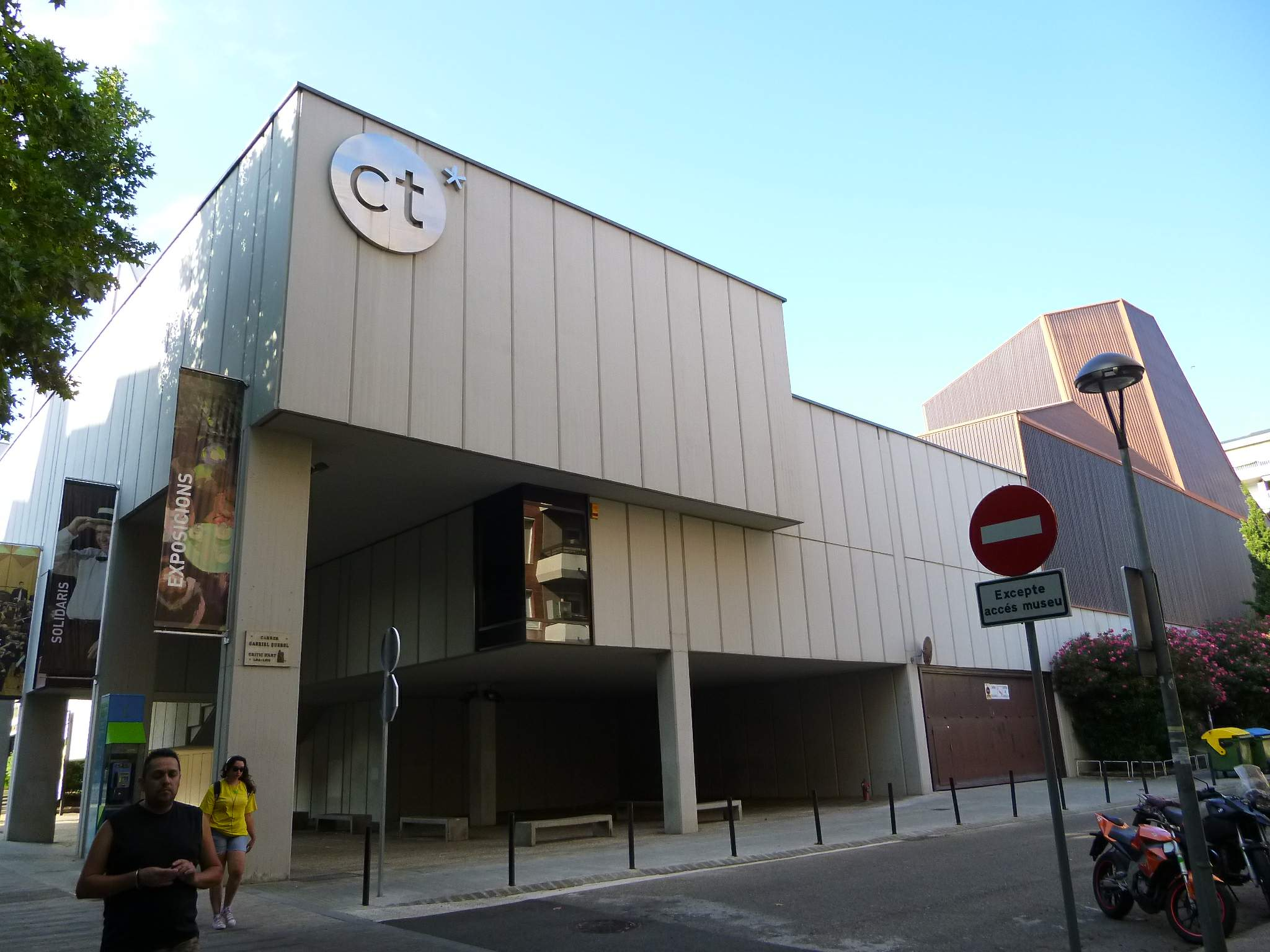 Centre Cultural Fundacio Caixa Terrassa (Terrassa)